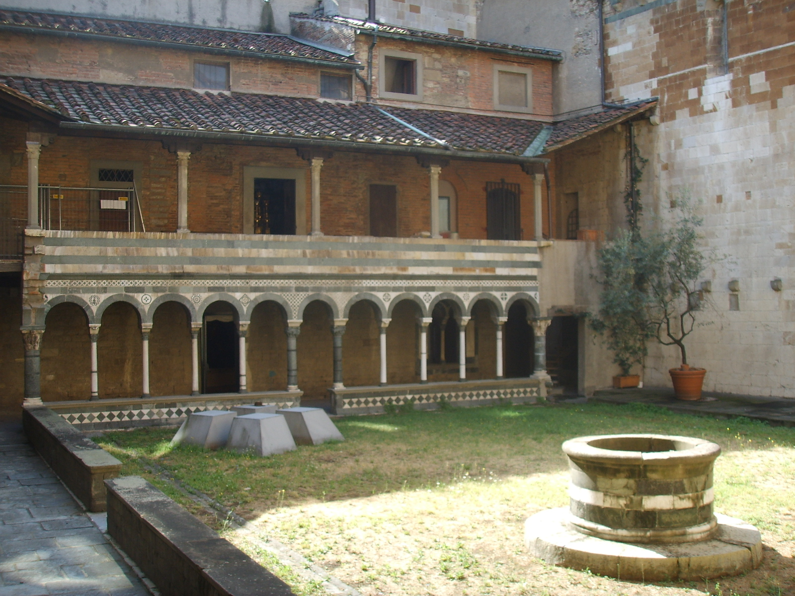 Chiostrino dell'opera del duomo di prato